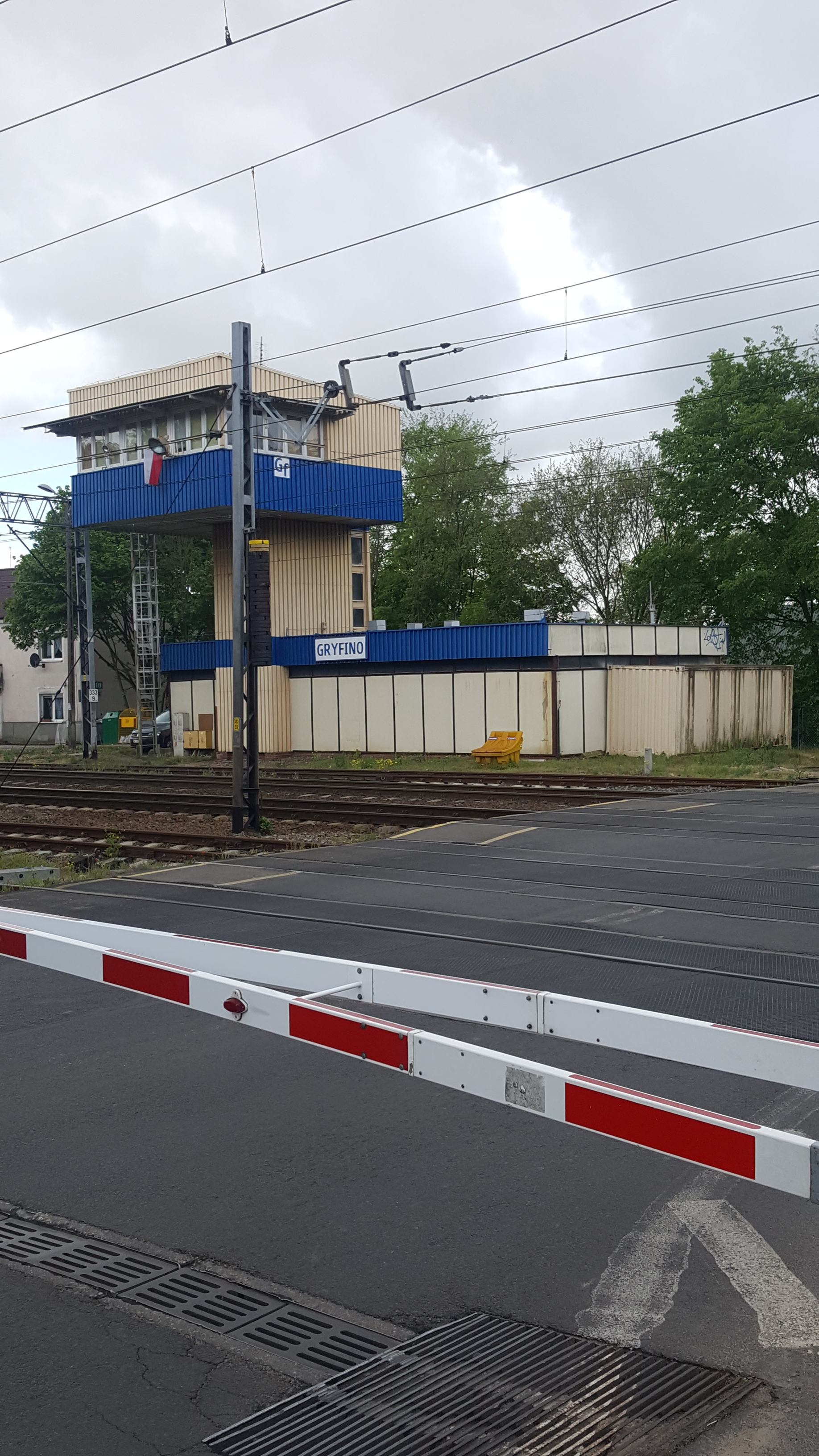 Przejazd kolejowy w Gryfinie